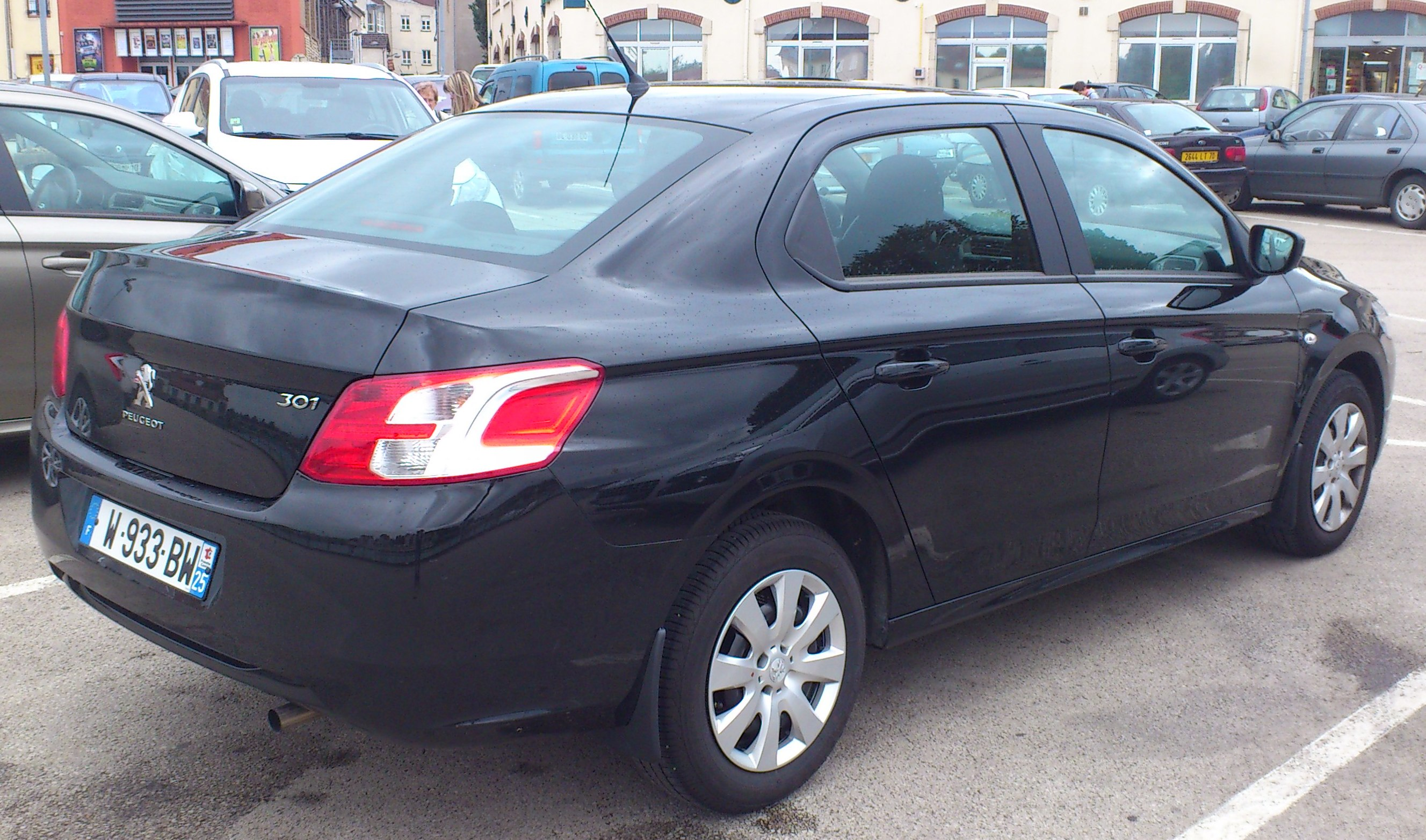 Une Peugeot 301 noire de profil arrière